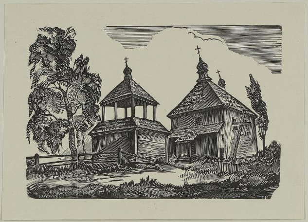 Беларуская (тарашкевіца): Гарадная (Haradnaja), пляц Рынак (plac Rynak). Царква Сьвятой Тройцы Памылковая атрыбутацыя: Віцебск (Viciebsk), Юр'ева Горка (Jurjeva Horka). Царква Сьвятога Юр'я